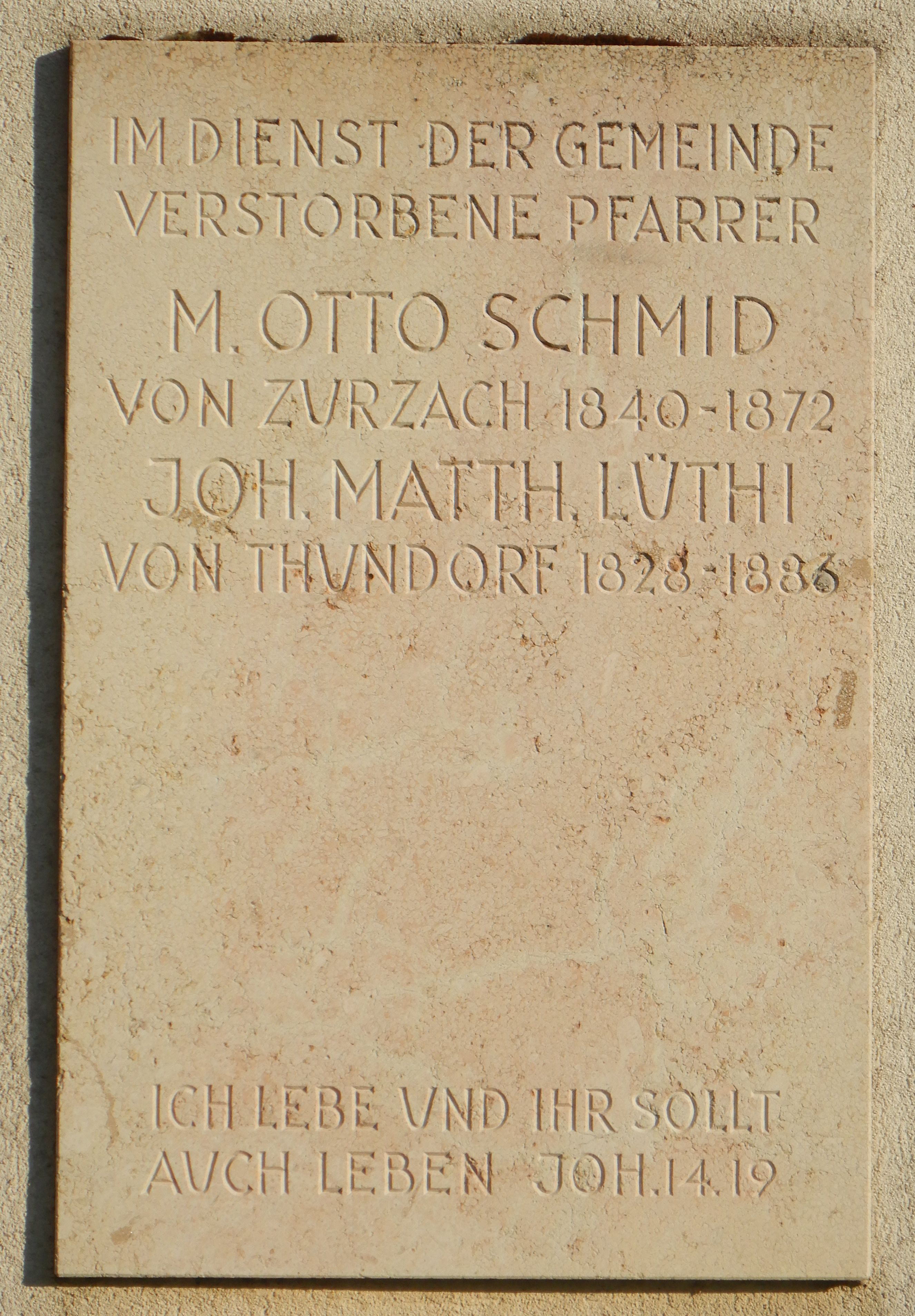 Gedenkstein an zwei Pfarrer der Reformierten Kirche Densbüren: Im Dienst der Gemeinde verstorbene Pfarrer M. Otto Schmid von Zurzach, 1840-1872 Joh. Matth. Lüthi von Thundorf, 1828-1886 Ich lebe und ihr sollt auch leben. Joh.14.19